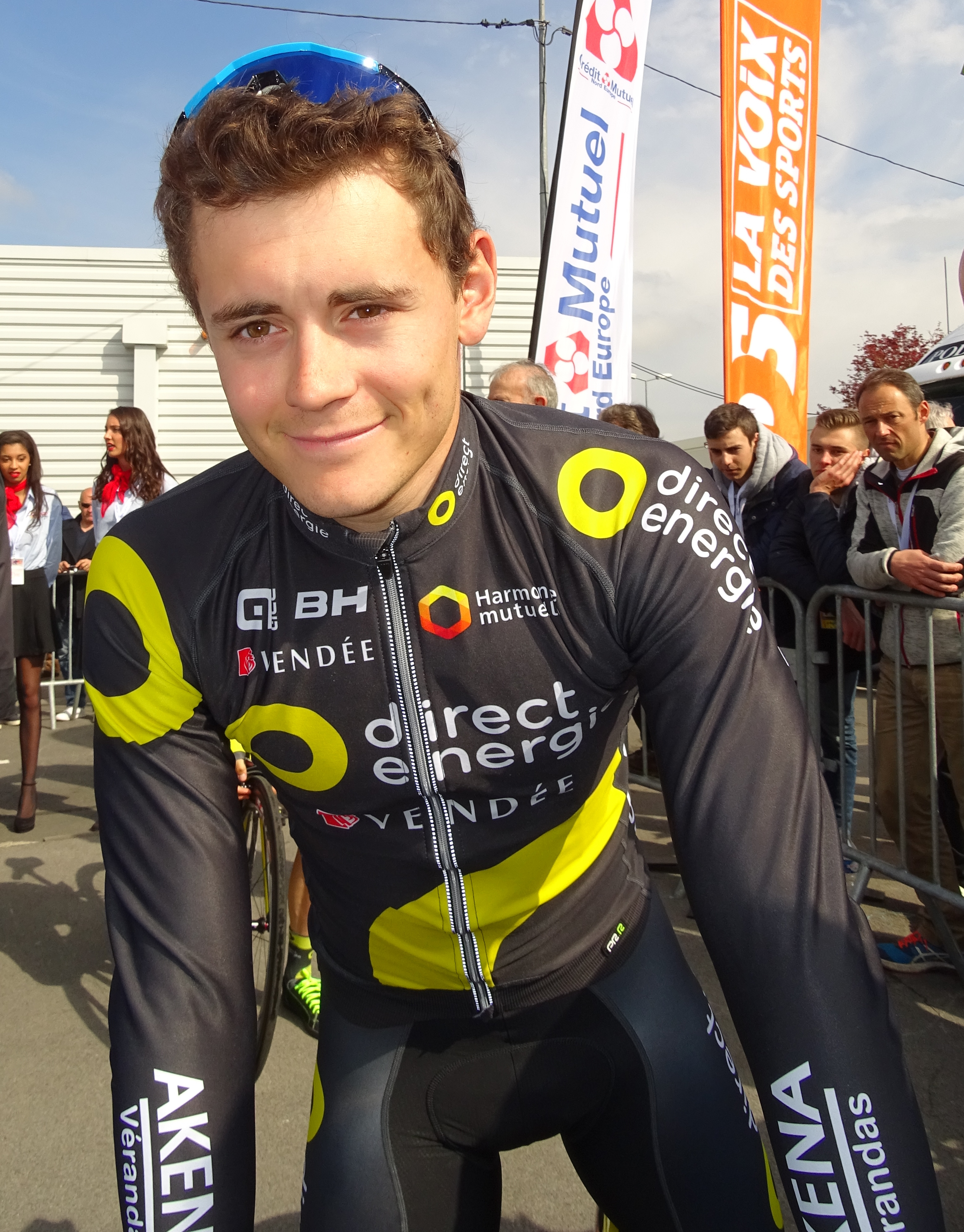 Reportage réalisé le jeudi 14 avril à l'occasion du départ et de l'arrivée du Grand Prix de Denain 2016 à Denain, Nord, Nord-Pas-de-Calais-Picardie, France.